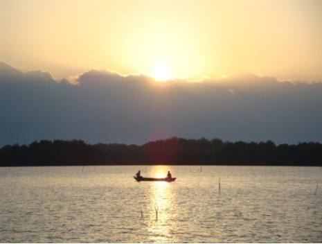 Una foto del balneario Boca del Cielo en el municipio de Tonalá (Chiapas).